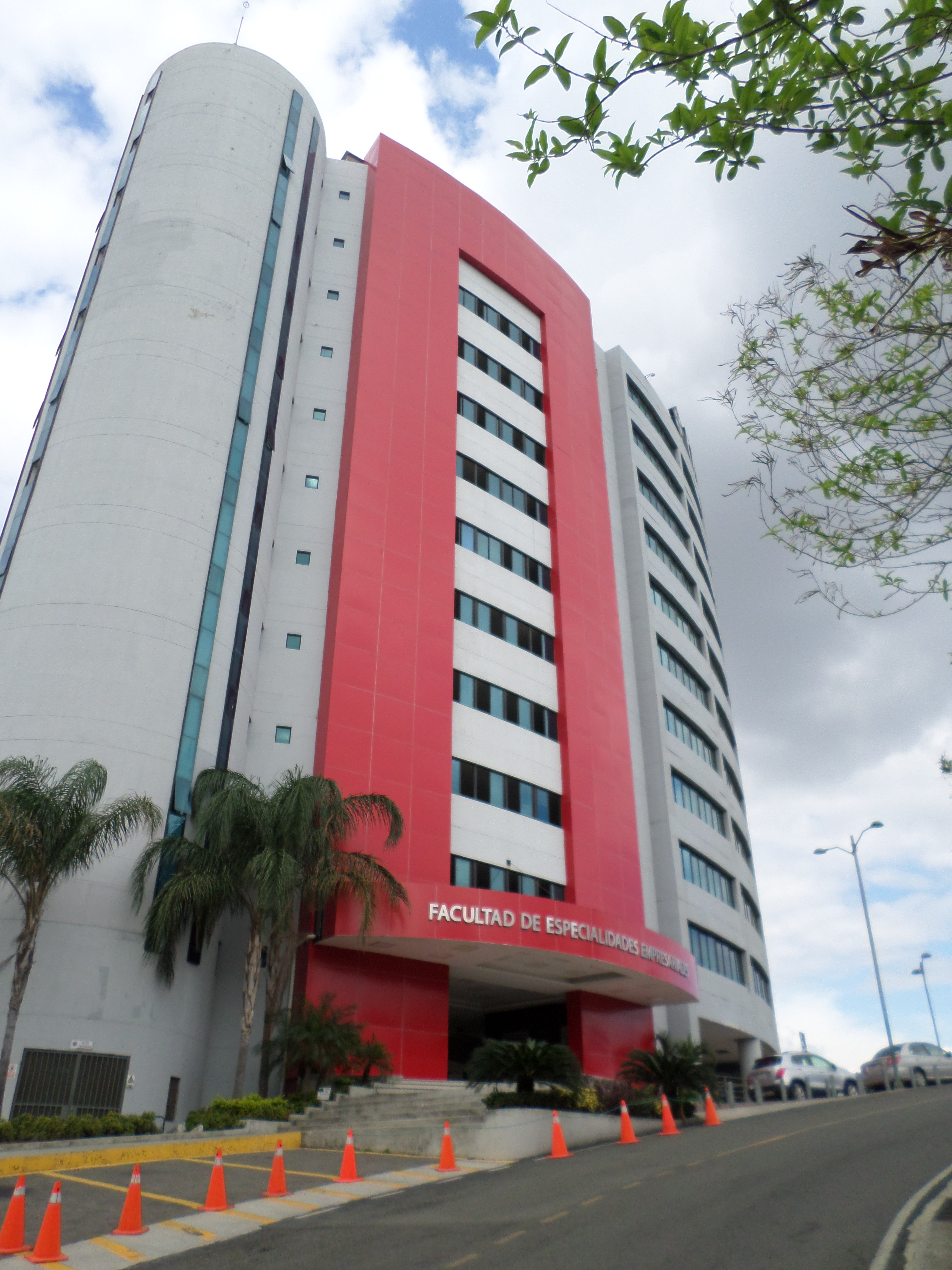 especialidades empresariales